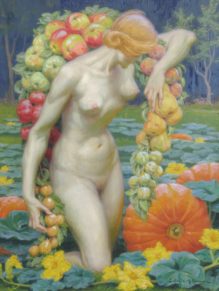 Pomone huile sur toile 1929 oeuvre de Ludovic Alleaume (1859-1941) musée des beaux-arts de Nantes Pomone, divinité des fruits et de l'art des jardins, est représentée dans ce tableau en allégorie de la nature domestiquée. Œuvre présentée dans l'exposition Musée nomade : Jardins égarés Salle d'exposition de l'école d'architecture : Galerie Loire Entre nature, artifice et écologie, le musée des Beaux-Arts cultive son jardin avec un ensemble d’œuvres du XVIIIe siècle à nos jours qui questionnent notre rapport à la nature : celle-ci a toujours été pour les artistes une source d’inspiration inépuisable. Extrait du site du Voyage à Nantes